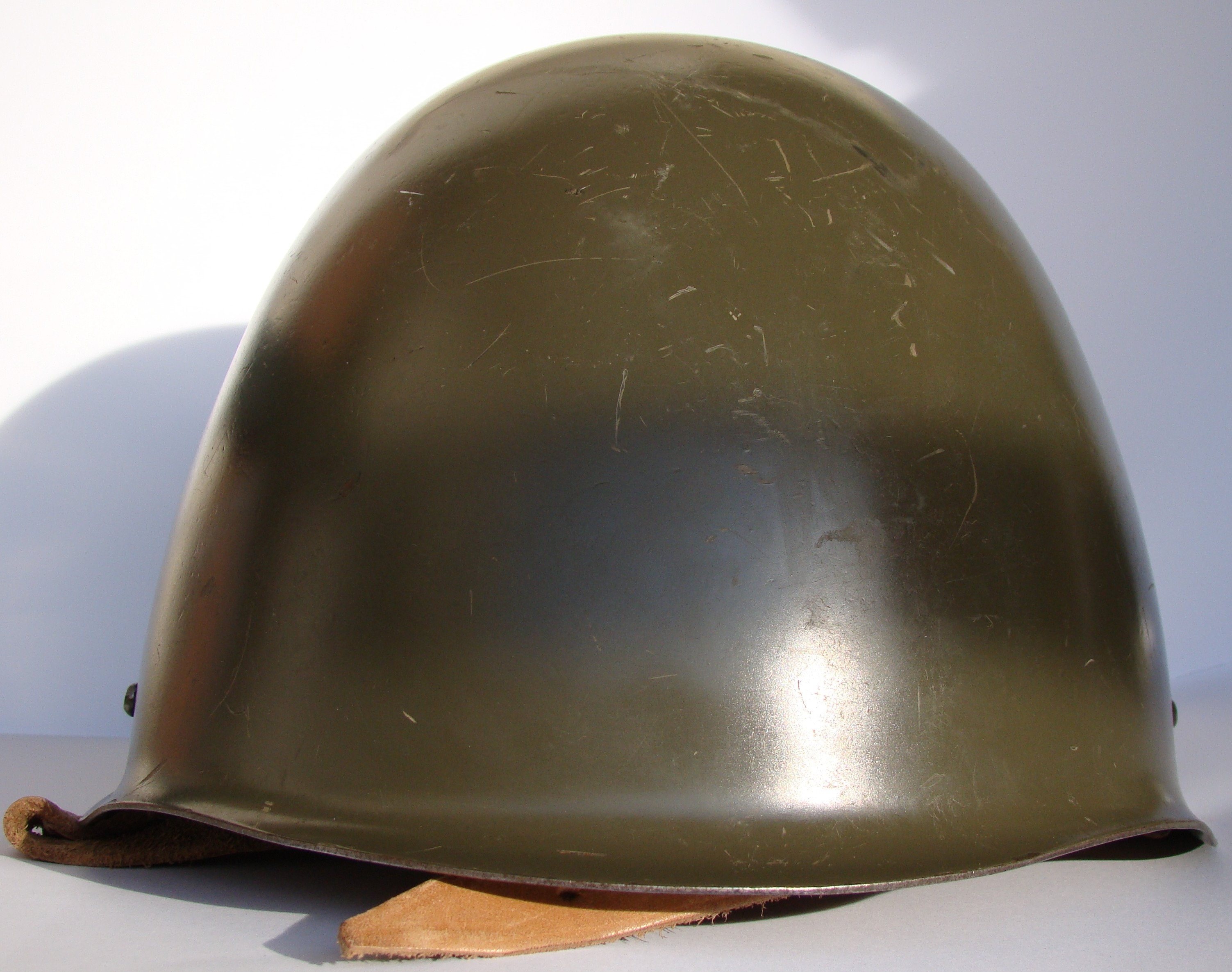 Hełm wz. 67 bez namalowanego orzełka. Wyprodukowany w roku 1971.